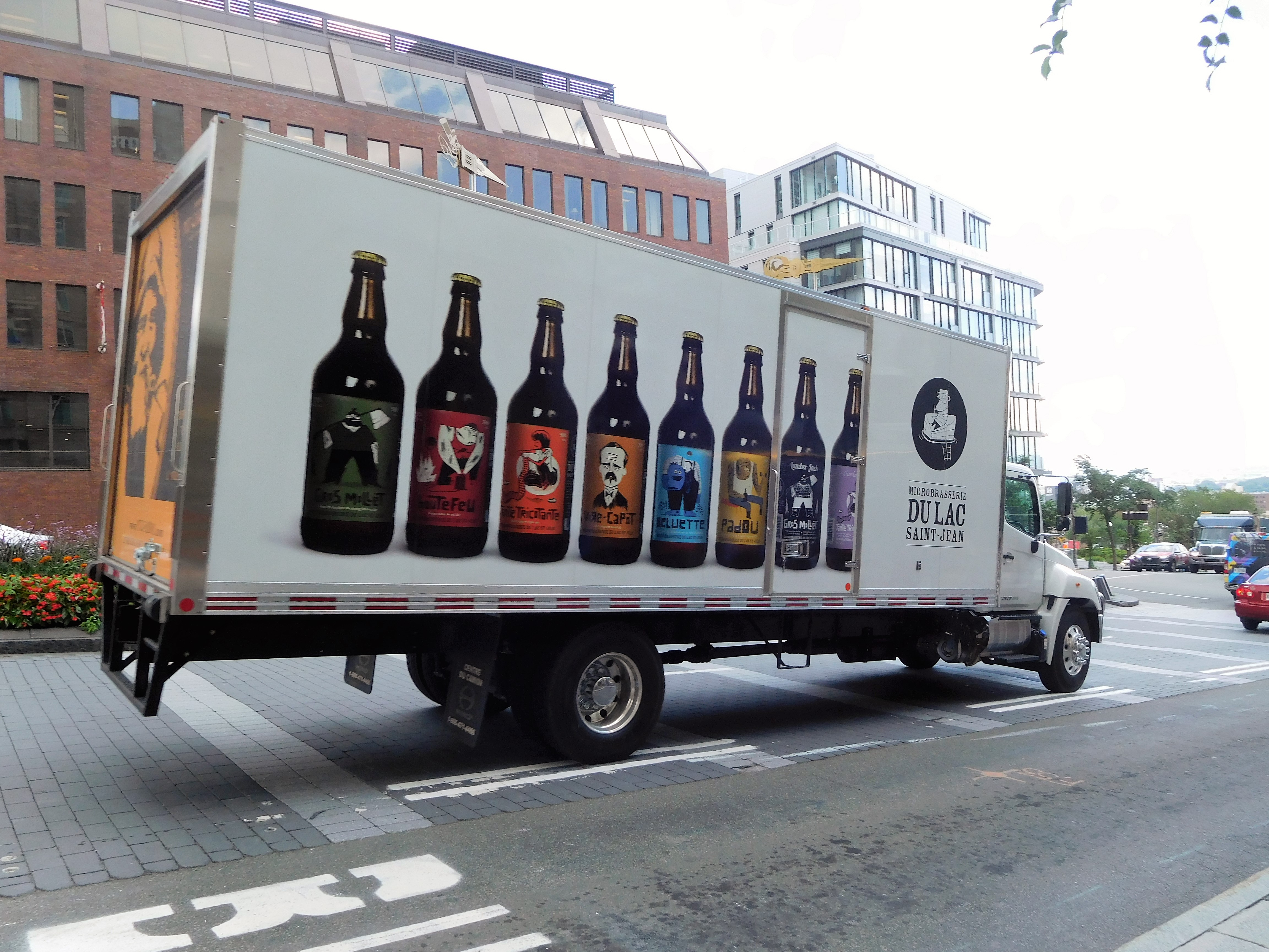 Camion de livraison de la Microbrasserie du Lac Saint-Jean Vue de l'avenue Honoré-Mercier, Québec